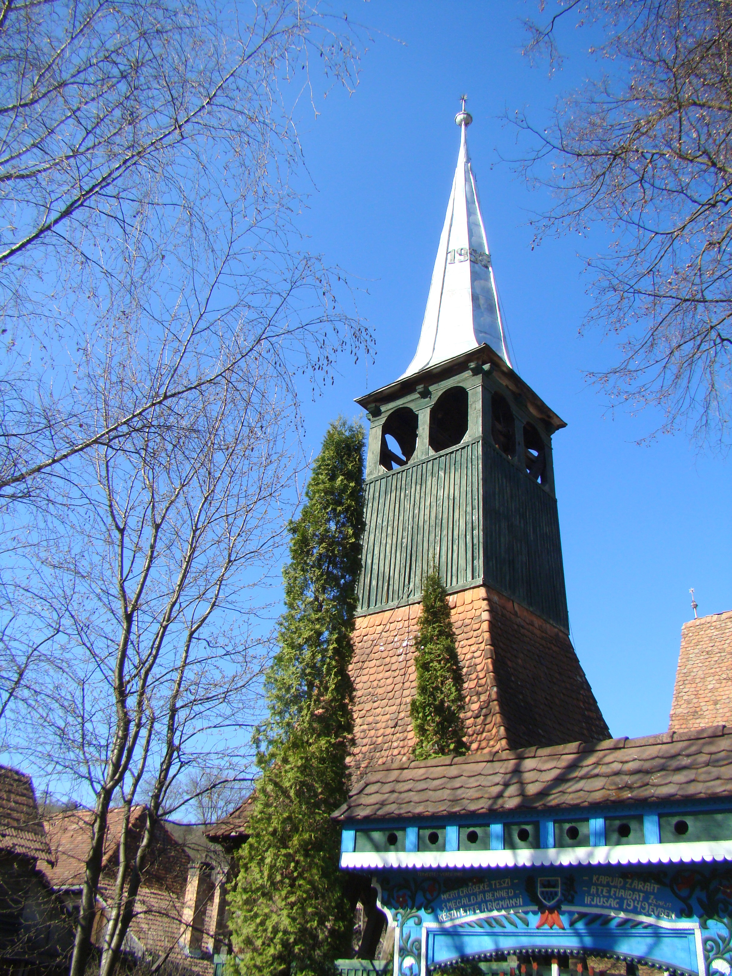 Turn-clopotniță din lemn, sat Rigmani; comuna Neaua 02